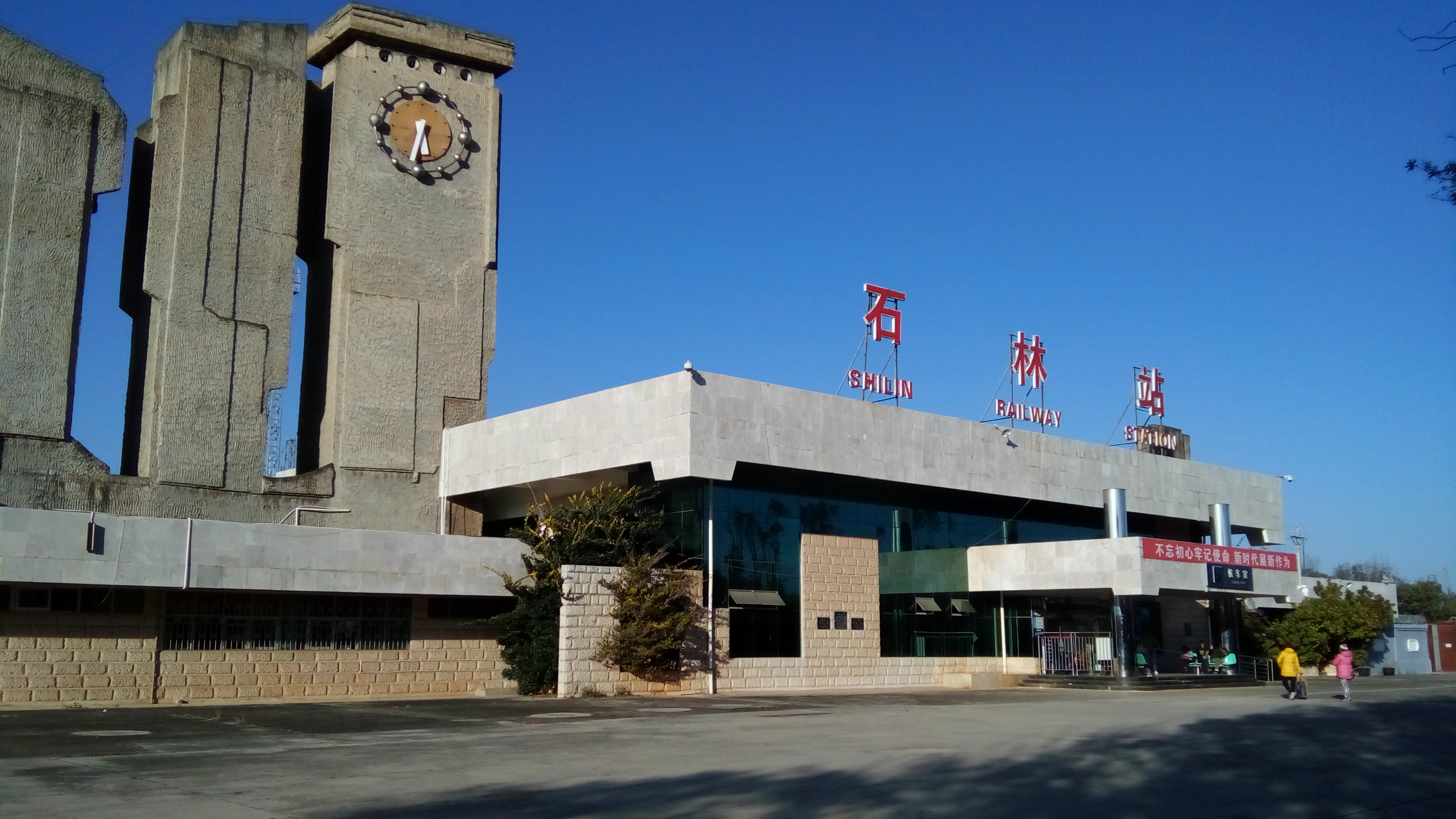 中文（中国大陆）: 南昆铁路石林站